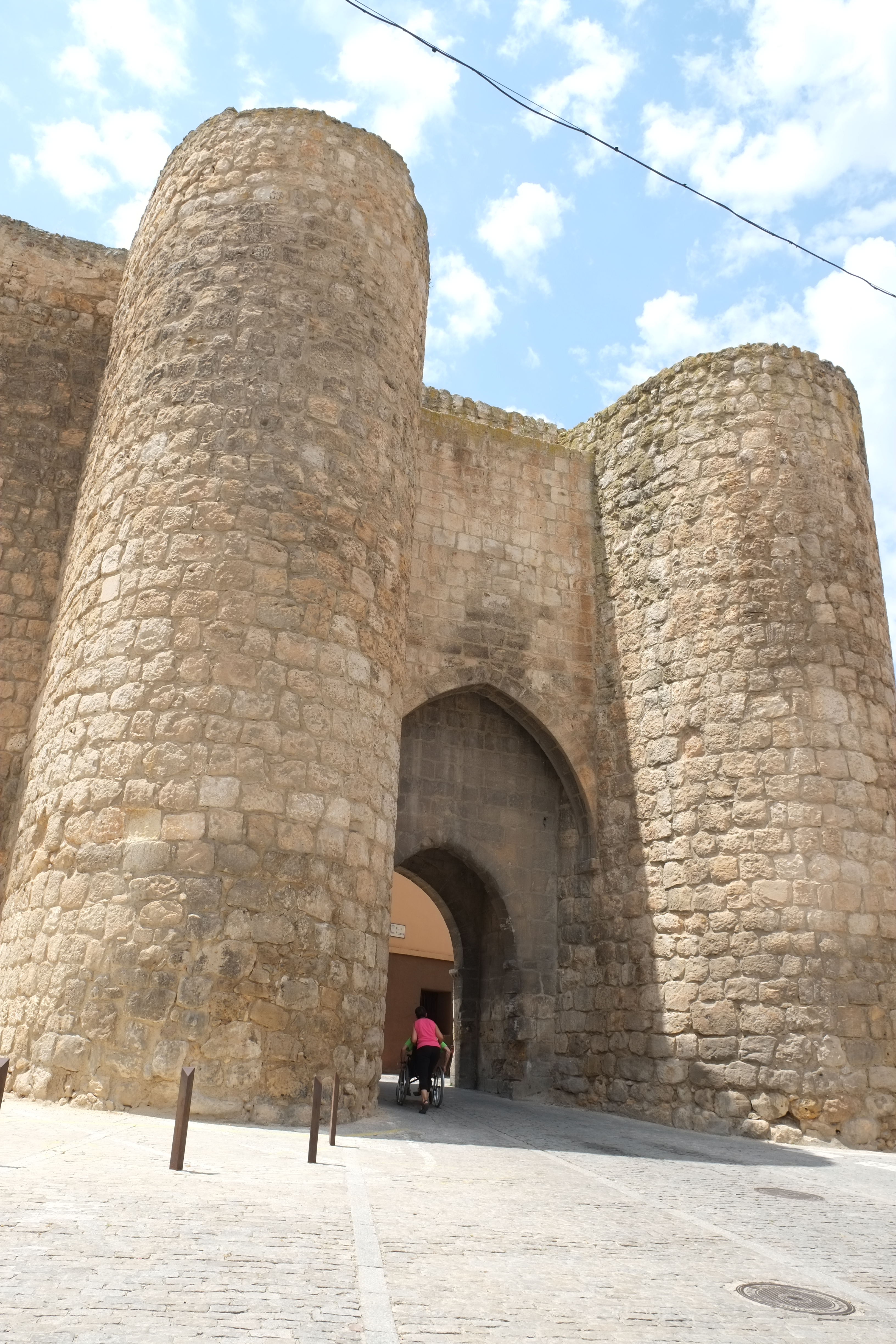 Almazán in der Provinz Soria (Spanien)